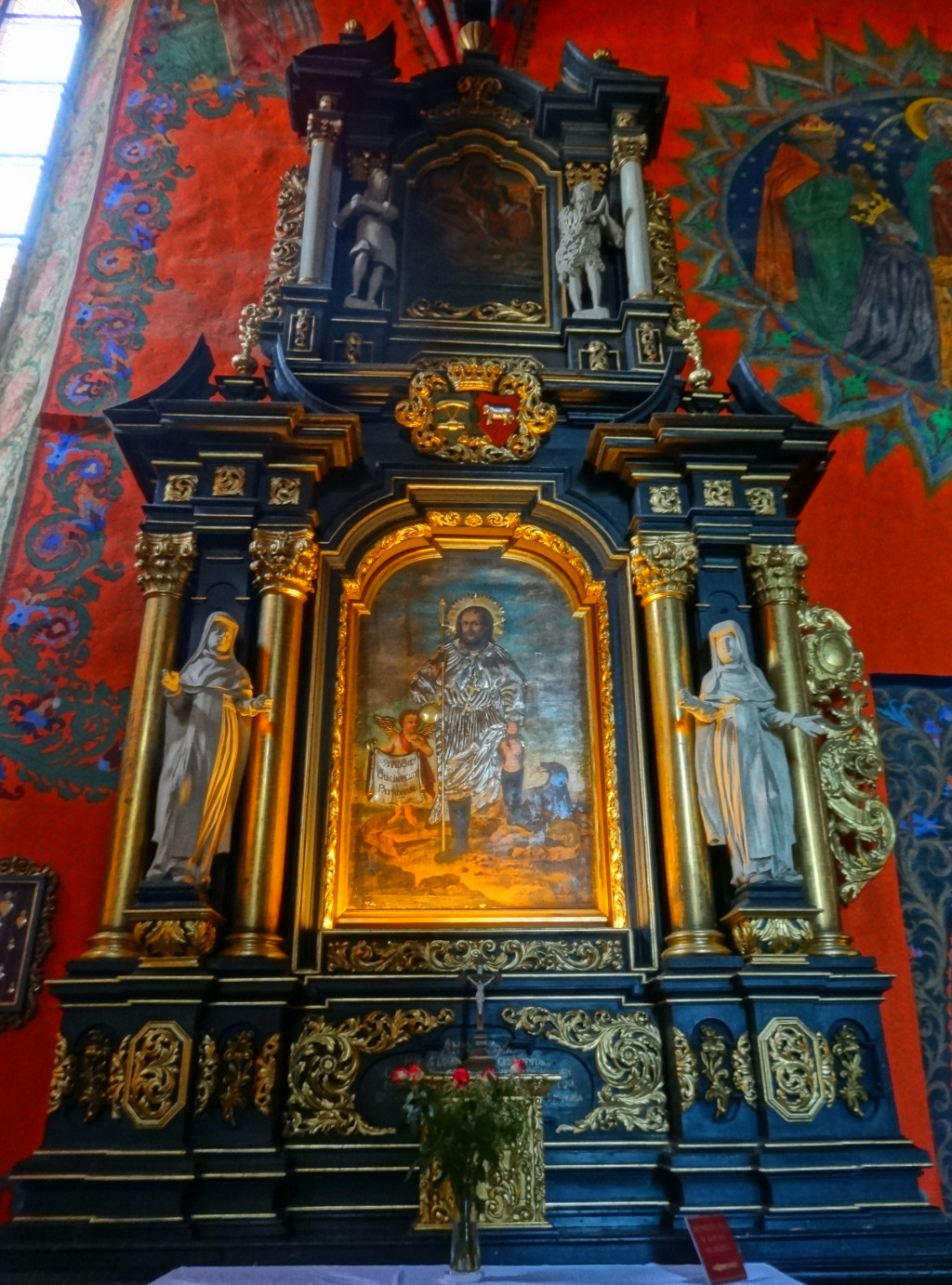 Katedra w Bydgoszczy. Ołtarz św. Rocha (1696 r.) fundowany przez Stanisława i Helenę Konarskich; w polu środkowym obraz św. Rocha (1841 r.) w srebrnej sukience, obok którego aniołek trzymający chustę z napisem: eris in peste patronus (będziesz opiekunem podczas zarazy); w górnej kondygnacji barokowy obraz Męczeństwo św. Kryspina i Kryspiniana (1690 r.)